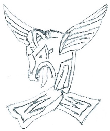 Sjøkua, avdelingsmerket i MJK.